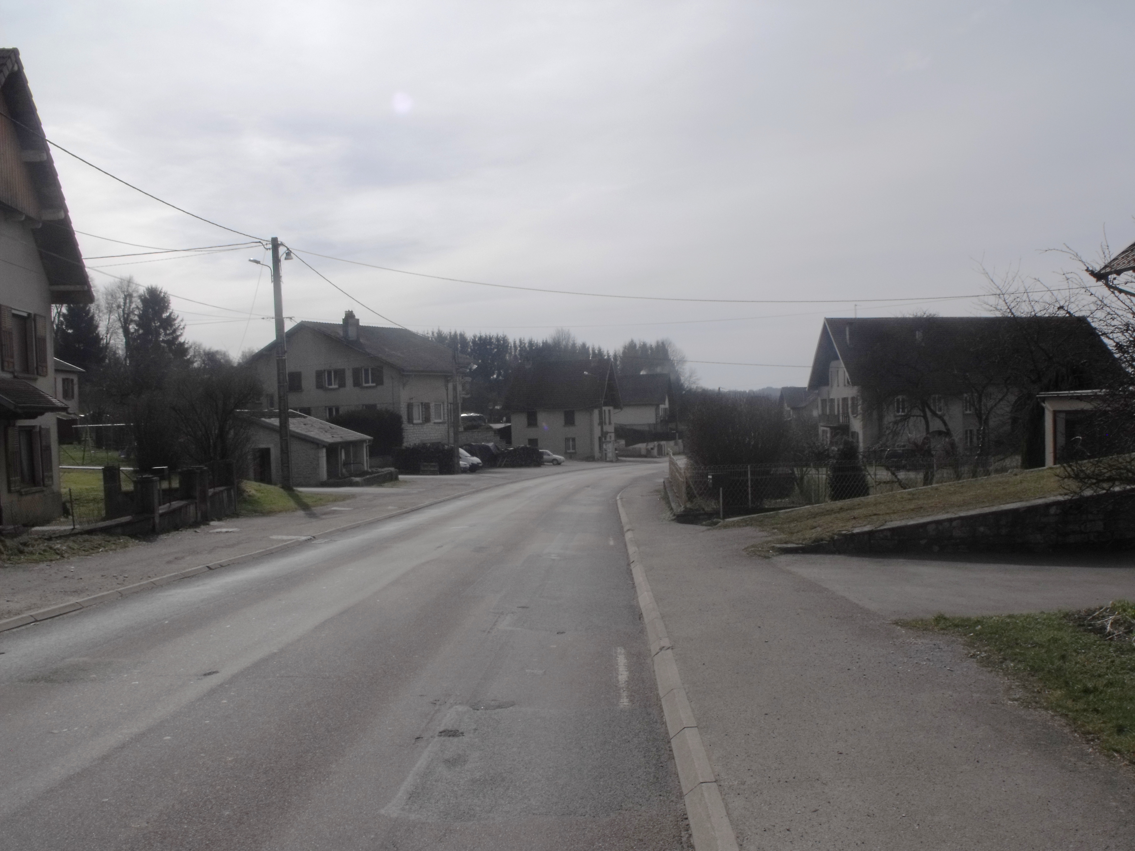 Rue principale, Aïssey, Doubs, France